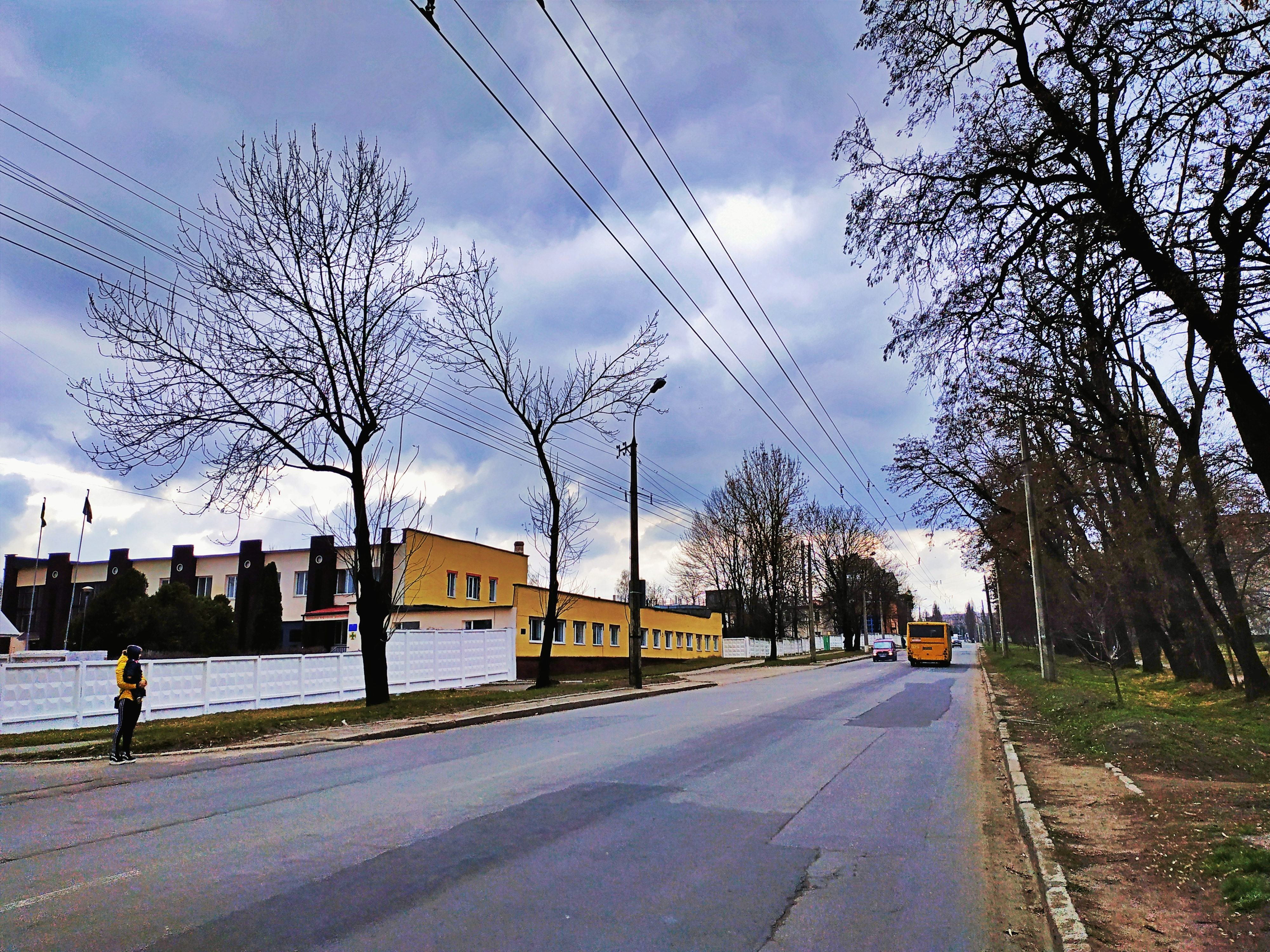 Хмельницький, вулиця Майборського у мікрорайоні Ракове